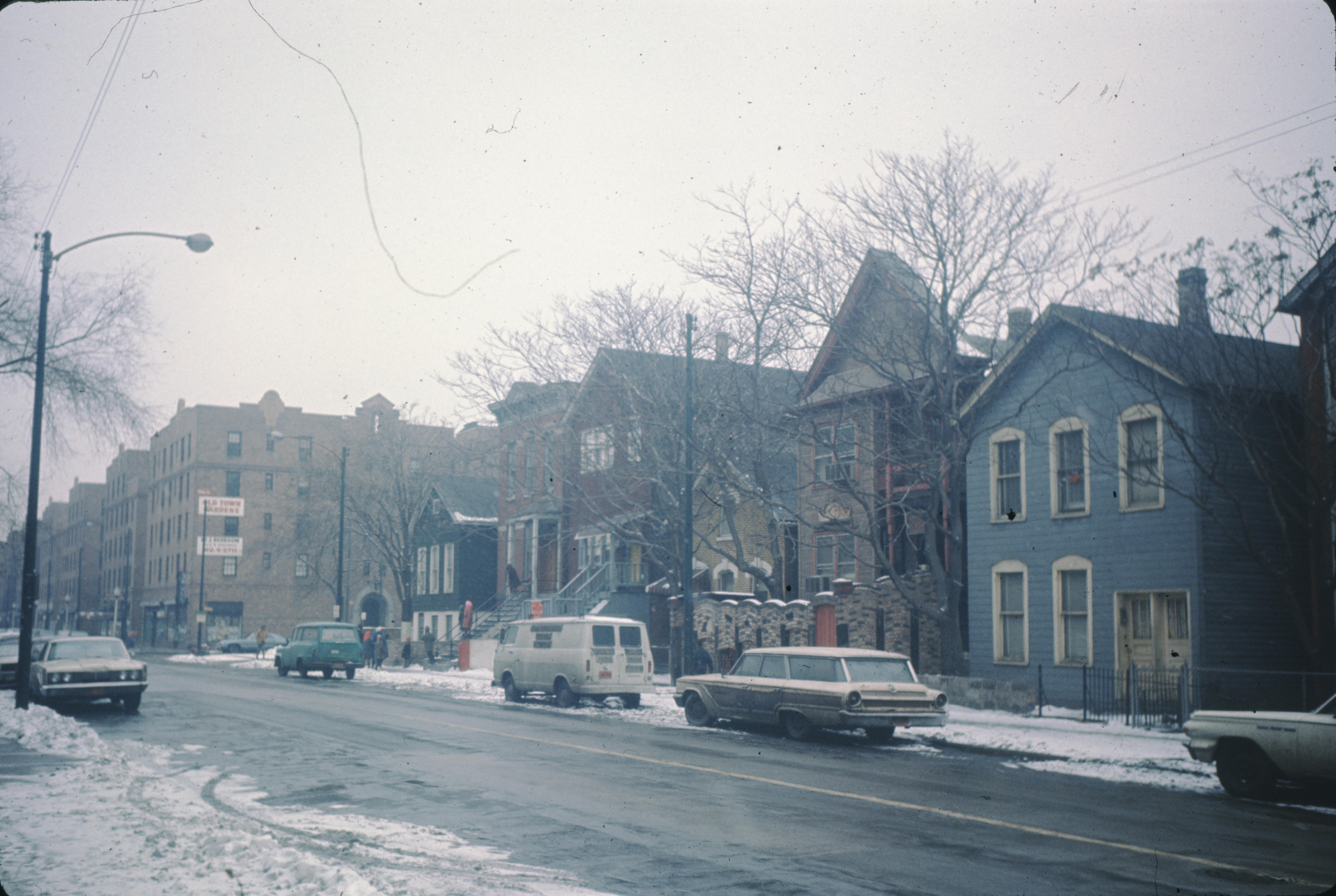 CyberViewX v5.16.55 Model Code=58 F/W Version=1.21